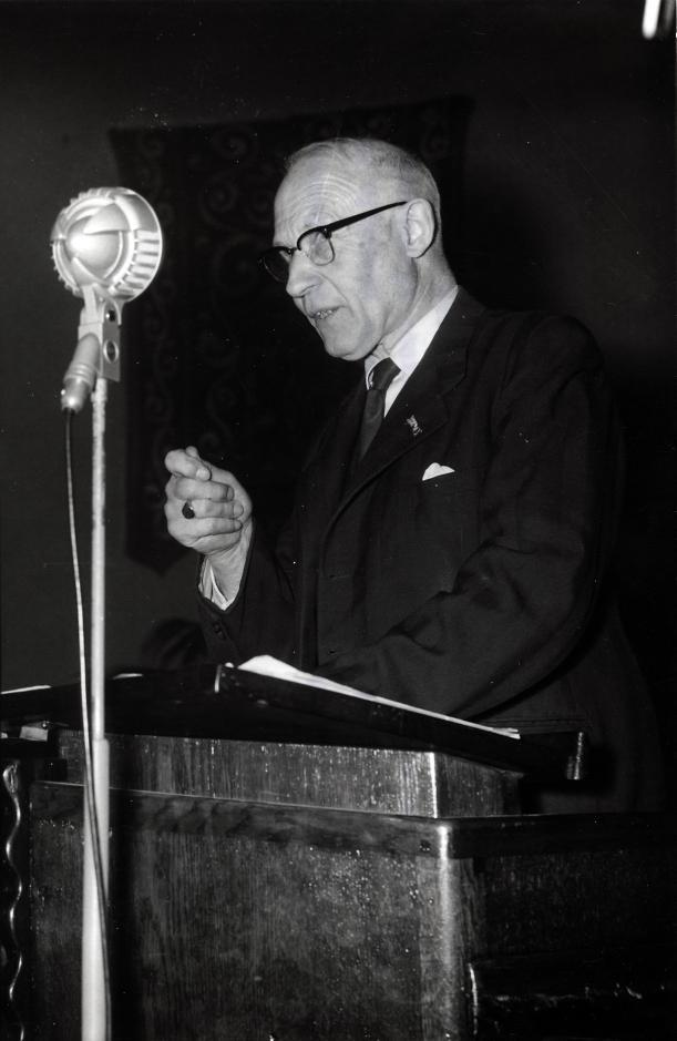 H.W. Tilanus, fractievoorzitter van de CHU achter het spreekgestoelte. Amsterdam, Nederland, 24 april 1957.